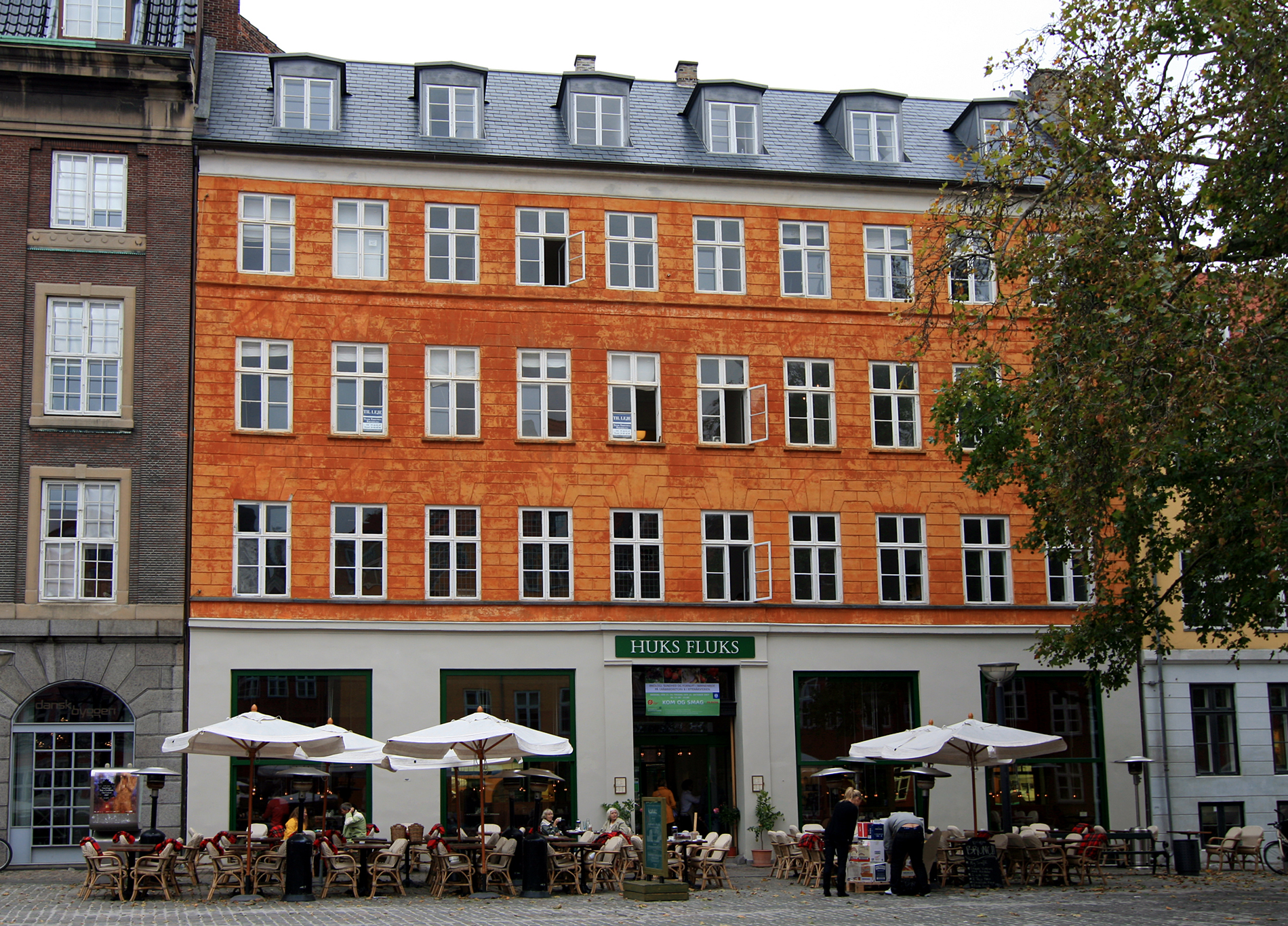 Den tidligere Petri Skole, Gråbrødretorv 8, København. Bygget 1729. Fredet.